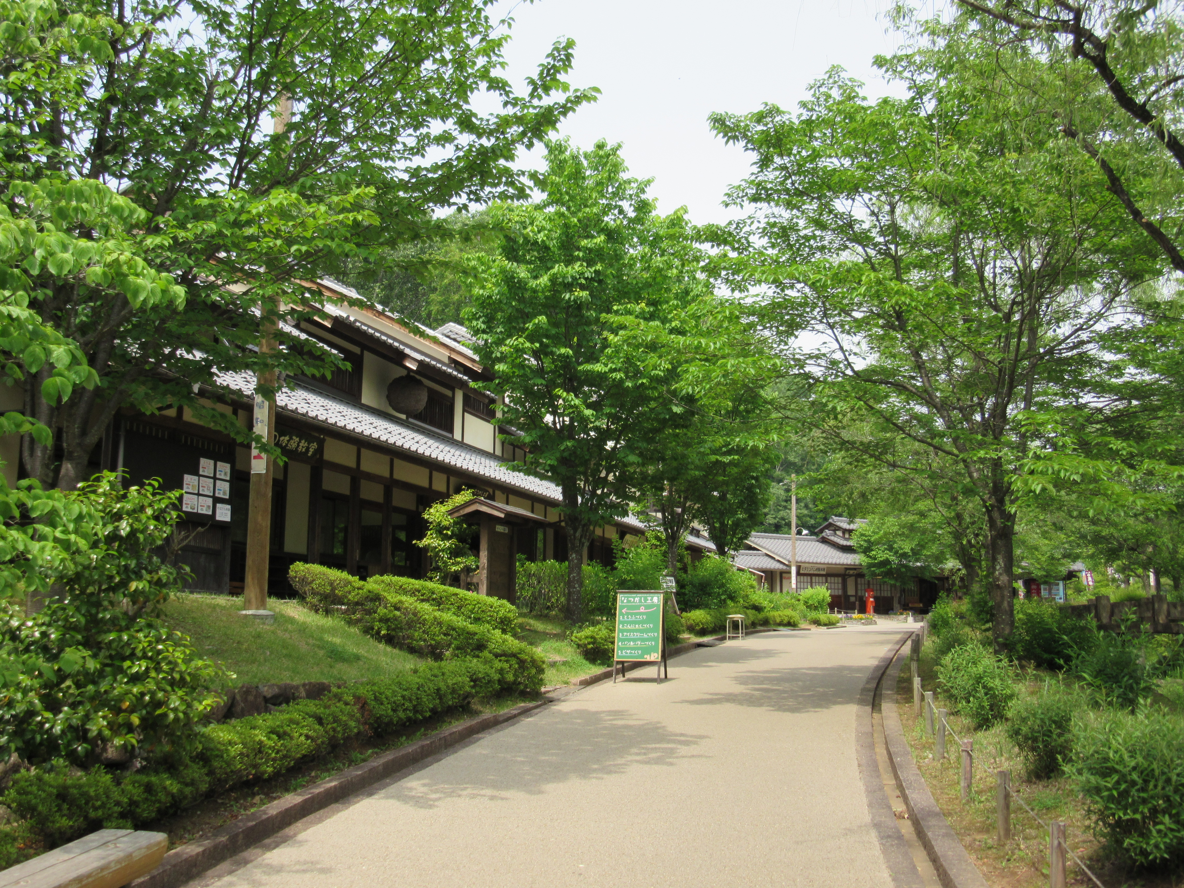 ぎふ清流里山公園